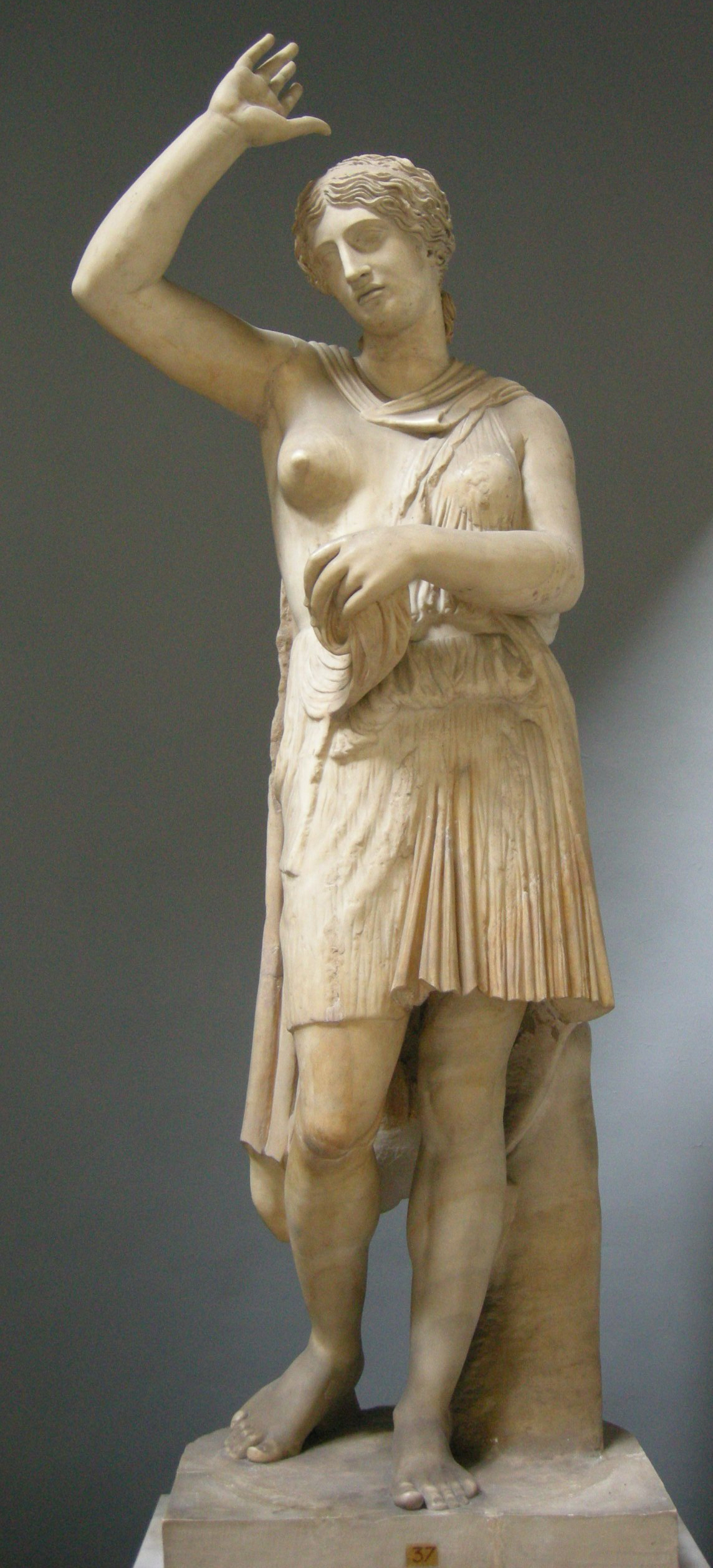 Amazzone ferita, copia romana da originale di policleto del 430 ac. circa, inv. 2272